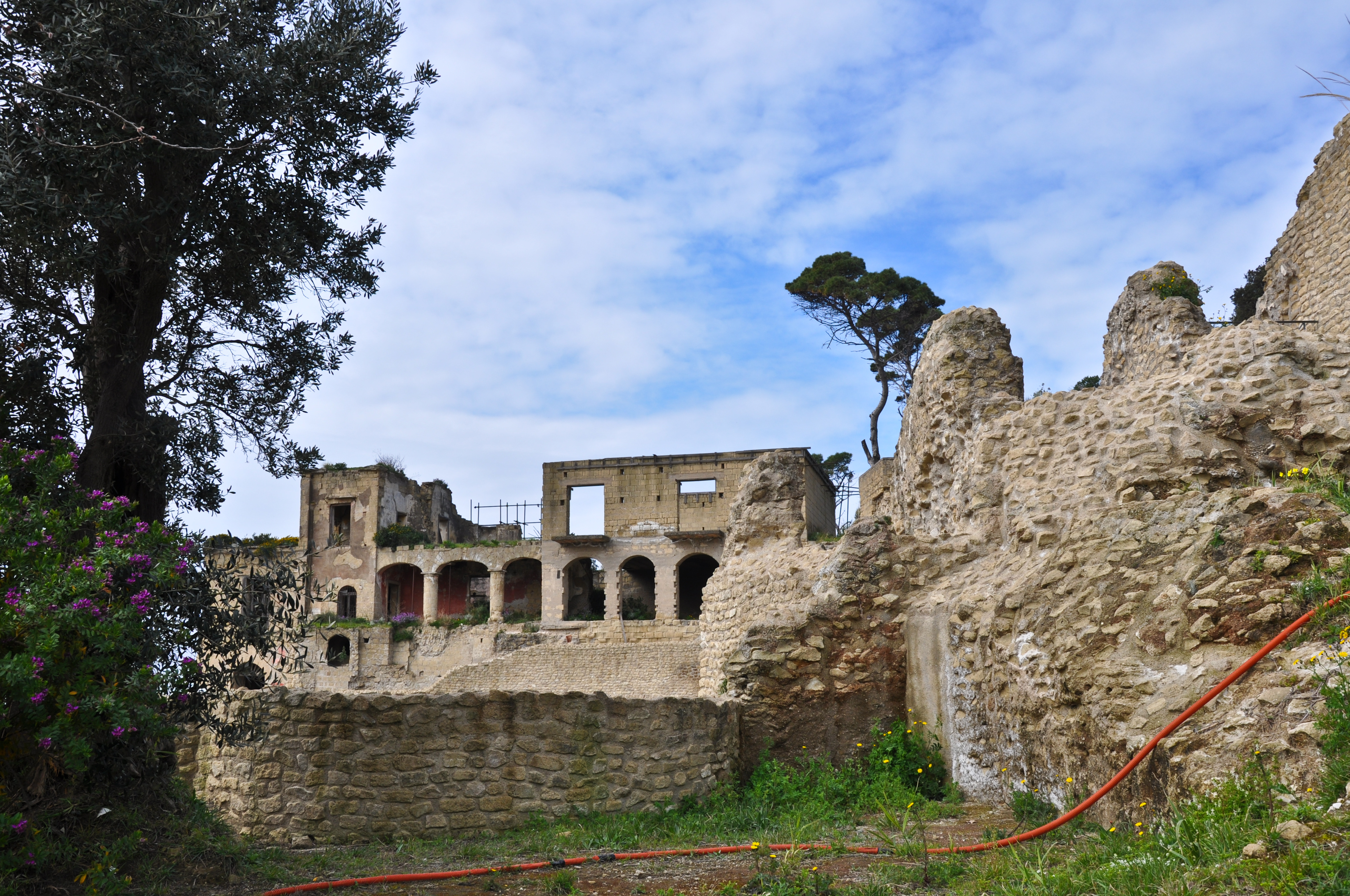 Napoli - Parco archeologico del Pausilypon